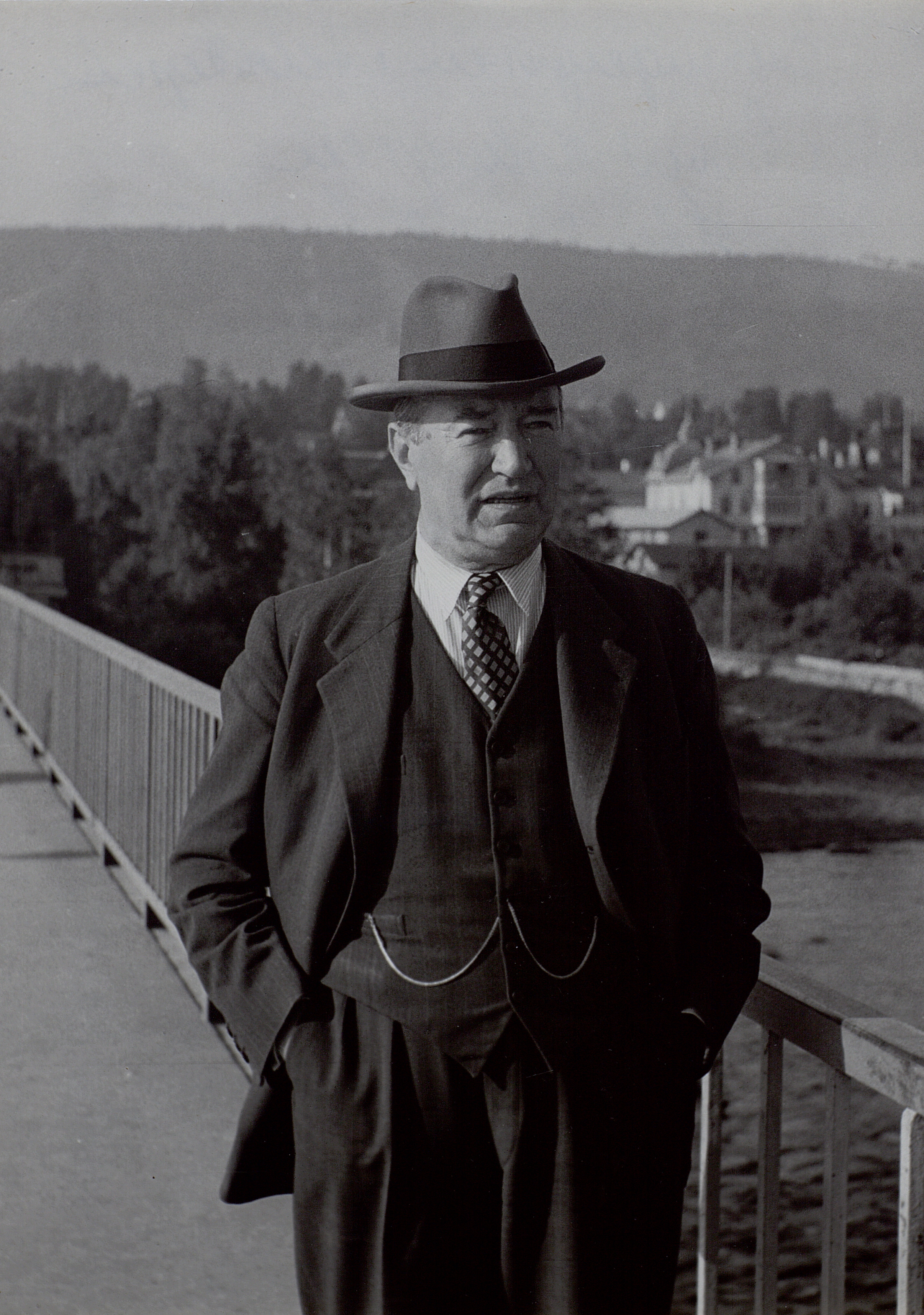 Arvid Holmgren, (1885-1951) överingenjör i Telegrafstyrelsen. Stående på bron över Ångermanälven i Sollefteå vid tiden för stationens projektering. Bilden tagen av Hans Björk.